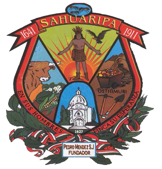 Escudo del municipio sonorense.